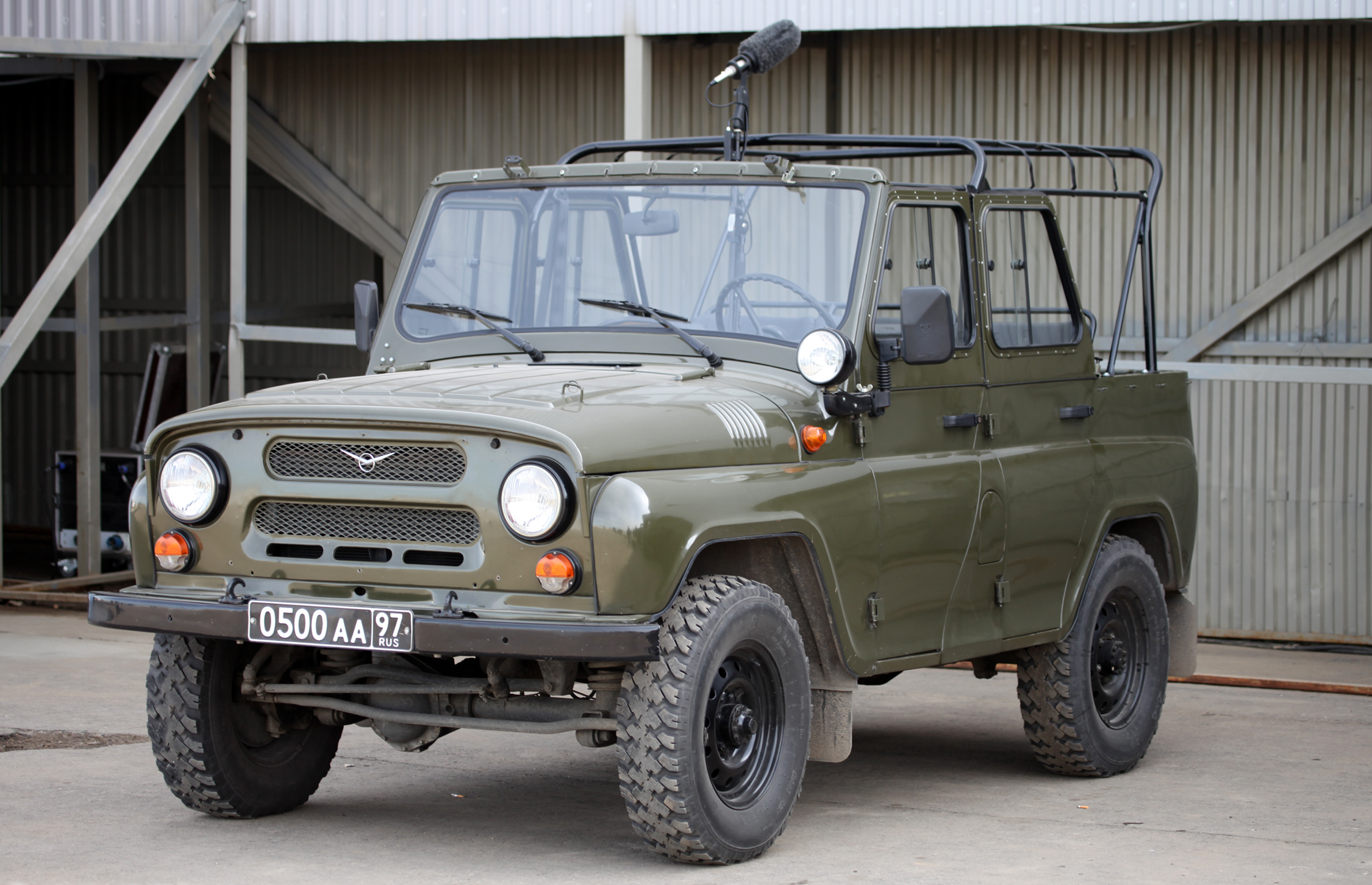 УАЗ, заменяющий парадный ЗИЛ на репетиции Парада Победы в Алабино.